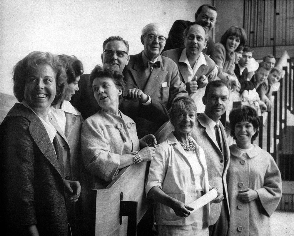 TV-teaterensemblen 1962/63